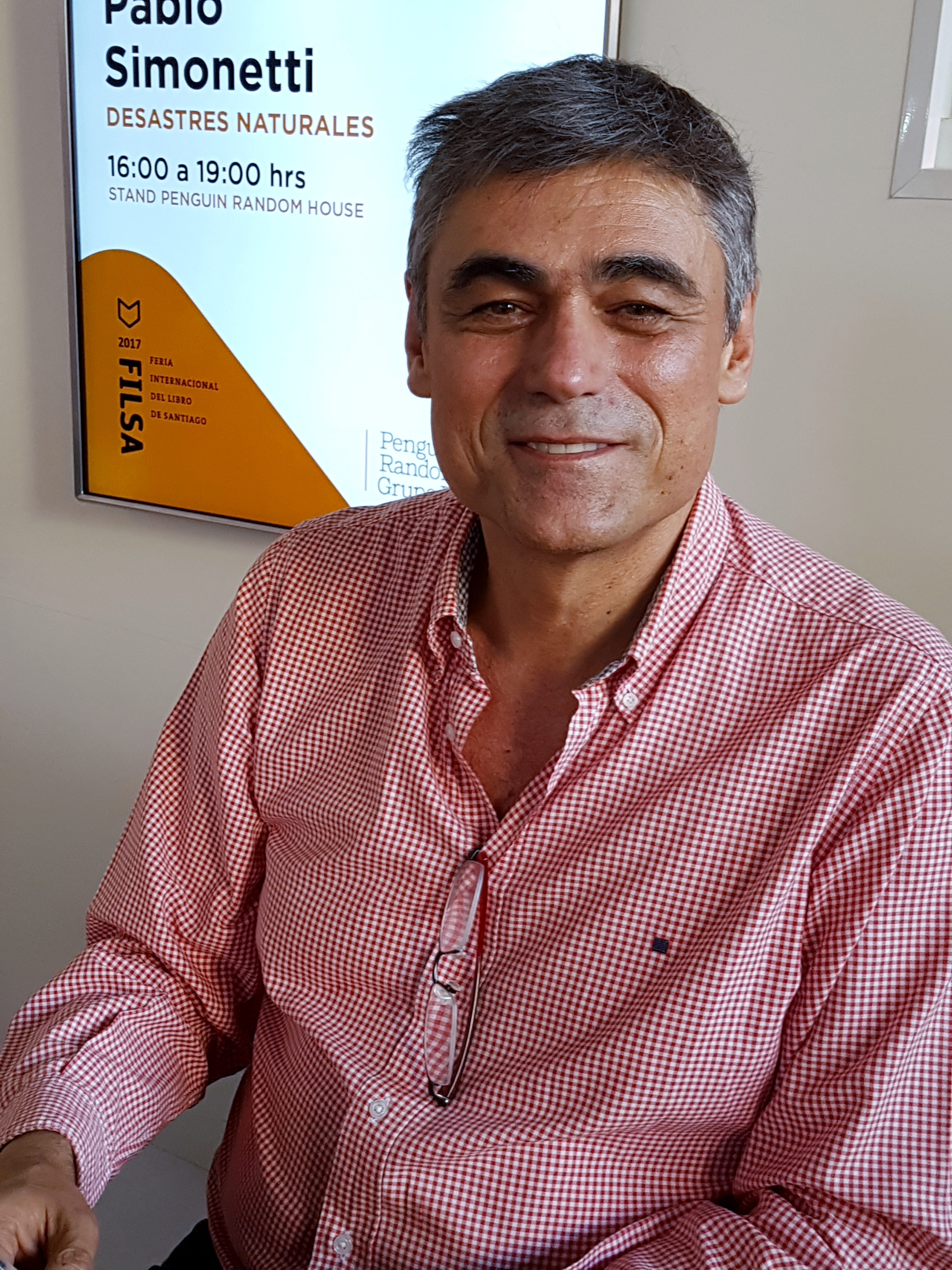 El escritor chileno Pablo Simonetti firma sus libros en la Feria Internacional del Libro de Santiago 2017.